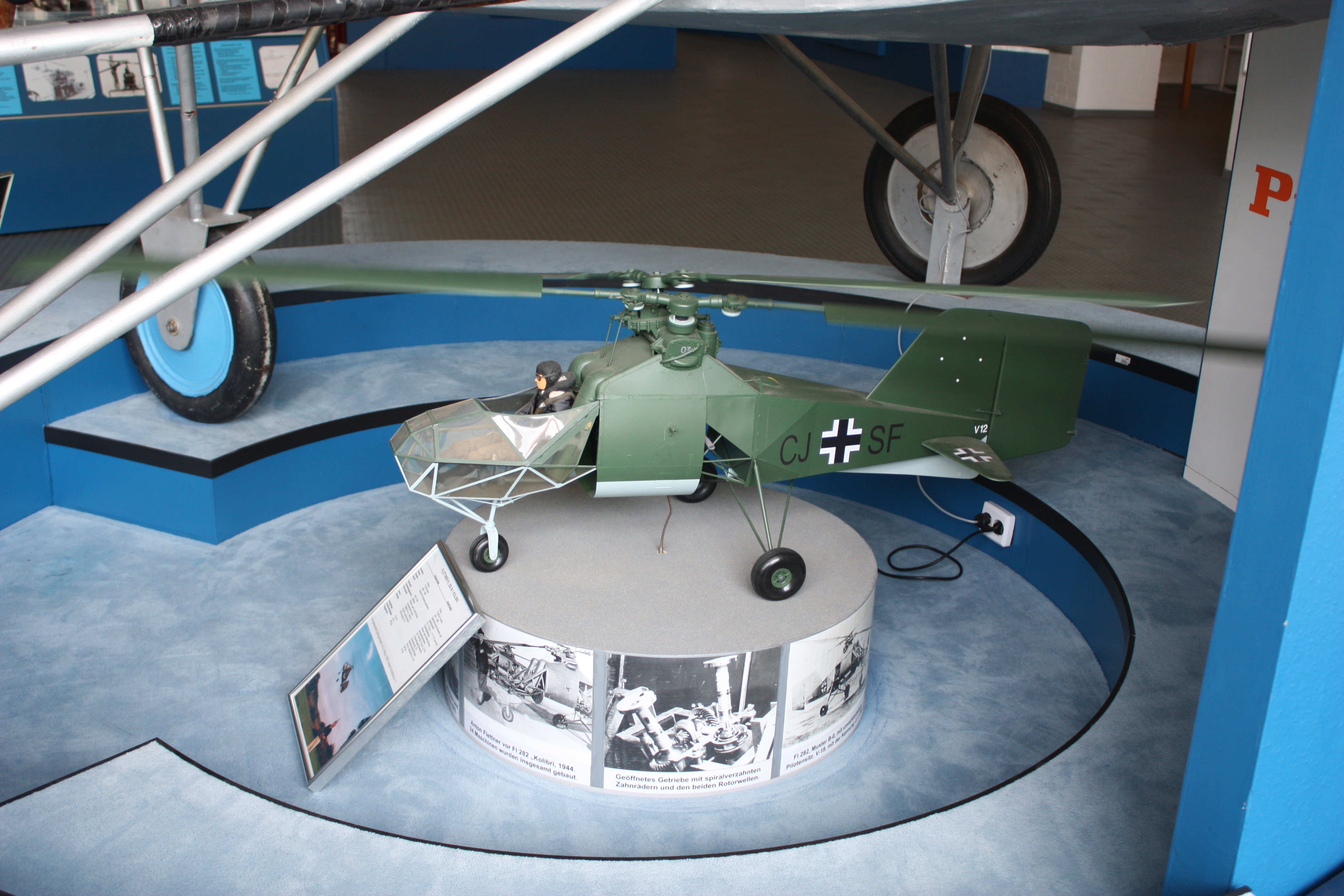 Hubschraubermuseum Bückeburg